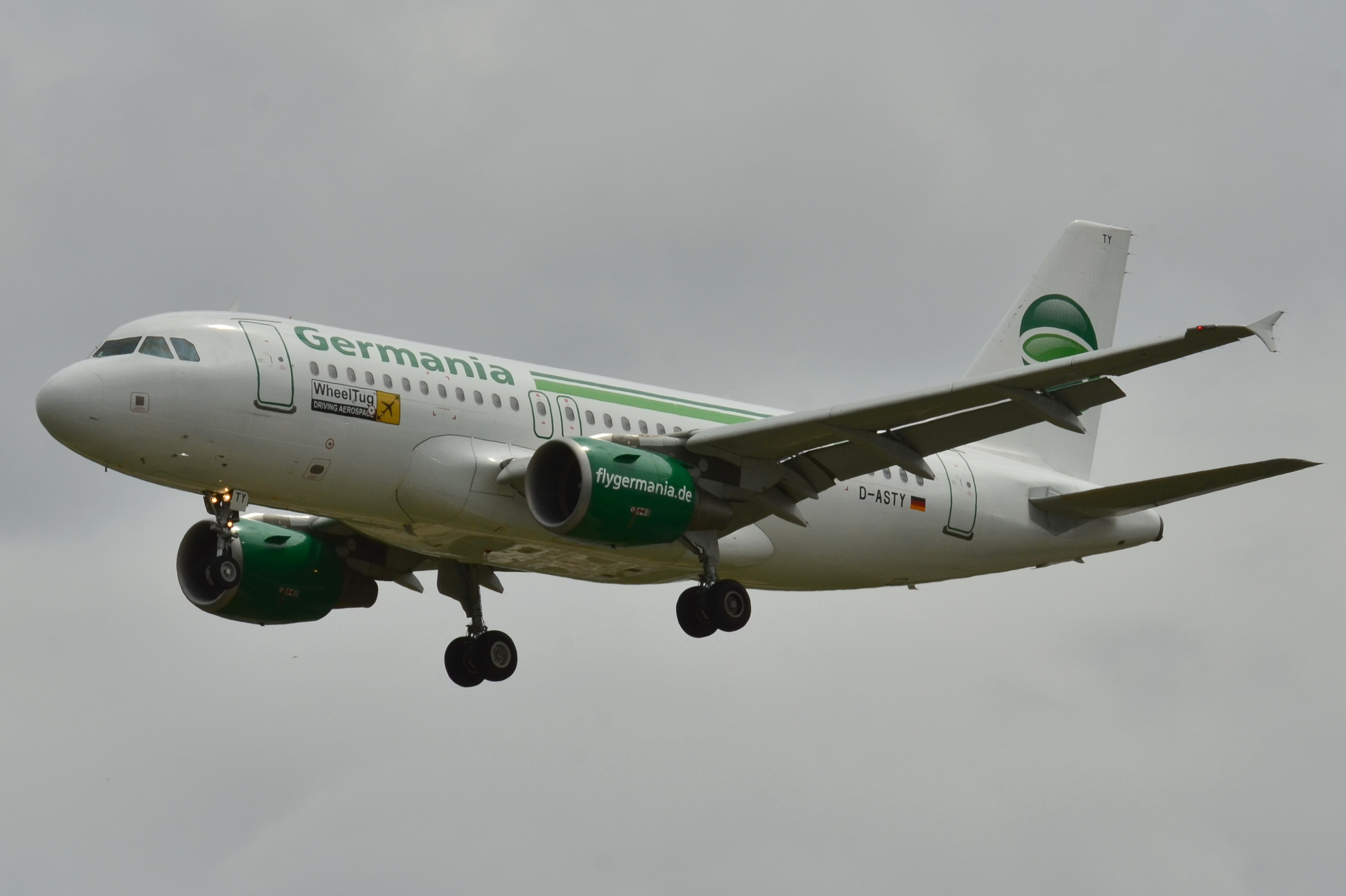 Photo prise à l'aéroport de Toulouse-Blagnac (LFBO) en France. Picture take at Toulouse-Blagnac Airport (LFBO) in France.